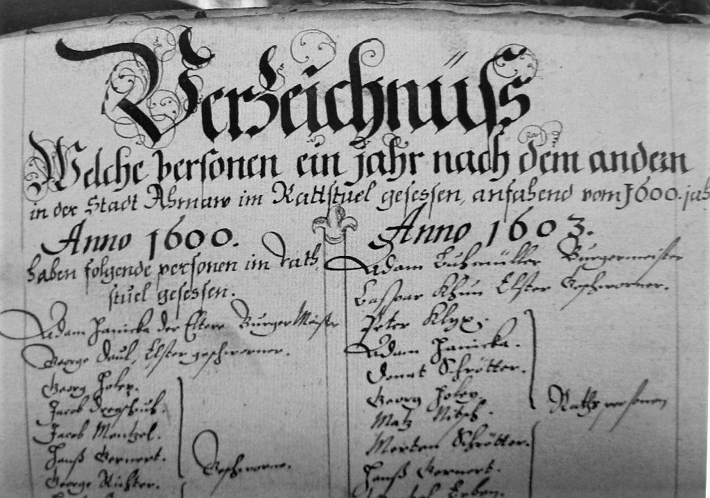 Ein Beispiel der Registrierung einer Bürgermeisterwahl von 1602/ 1603